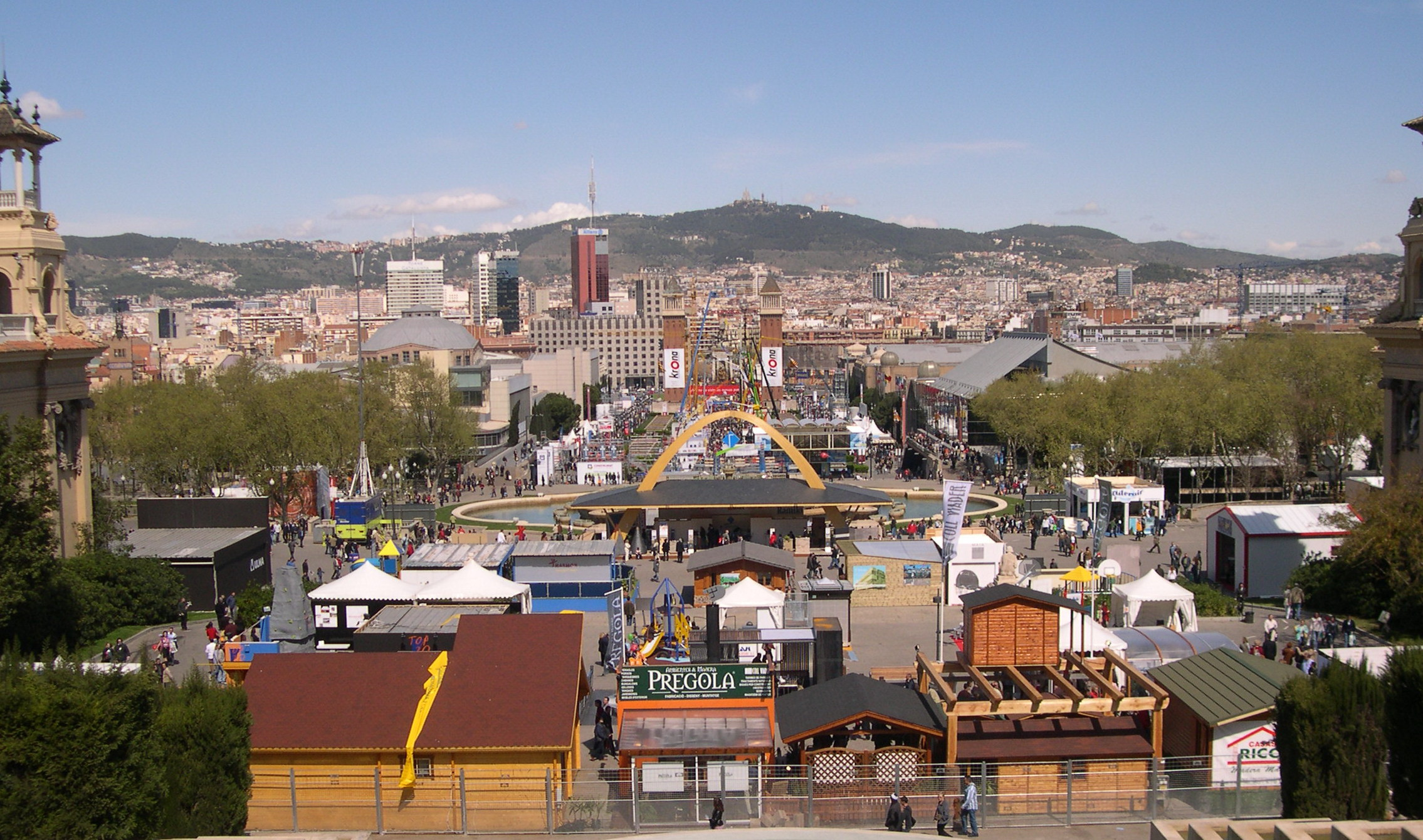 La Fira de Barcelona durant la celebració de Construmat 2005